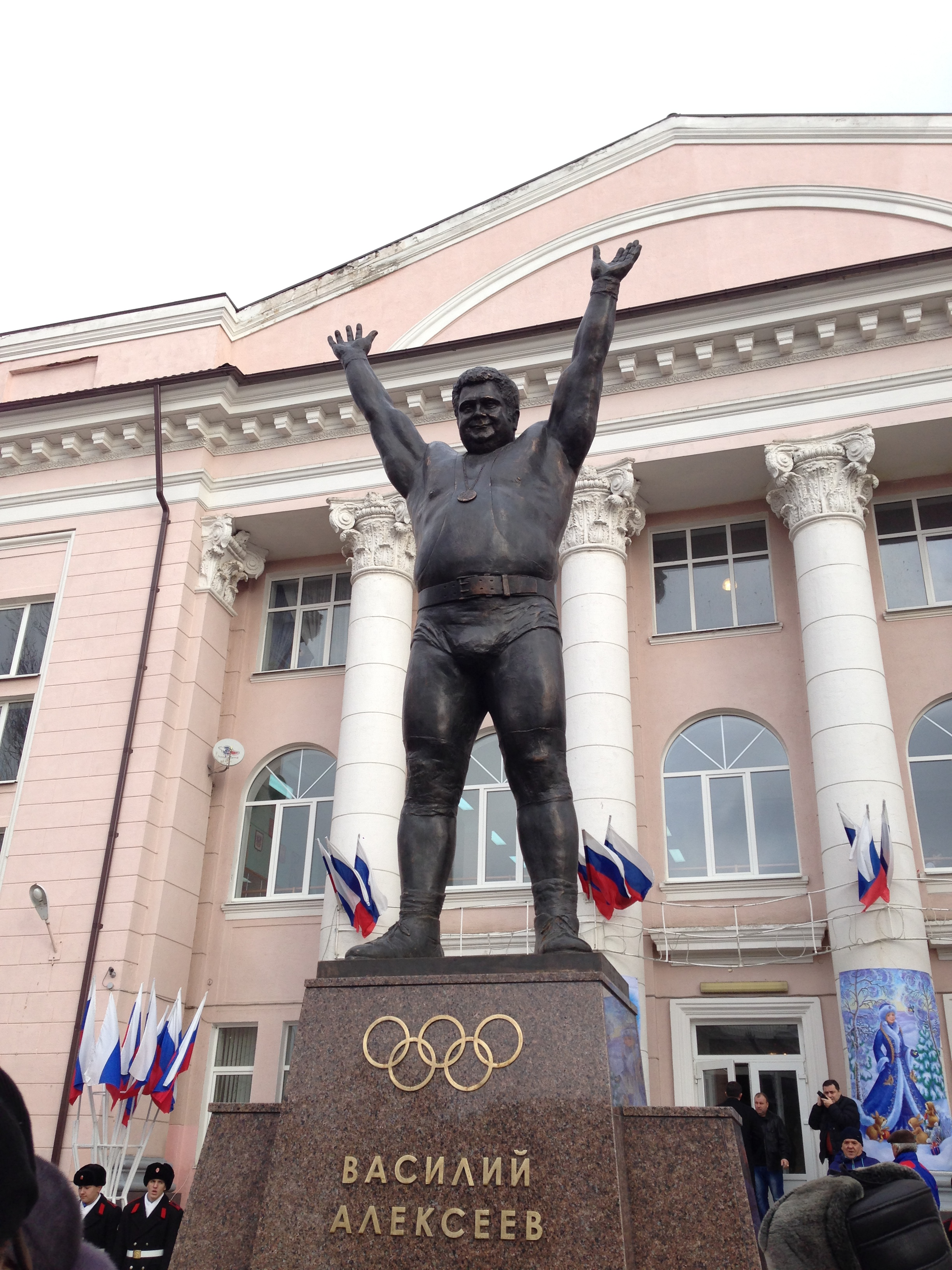 Памятник В.И. Алексееву в г.Шахты.